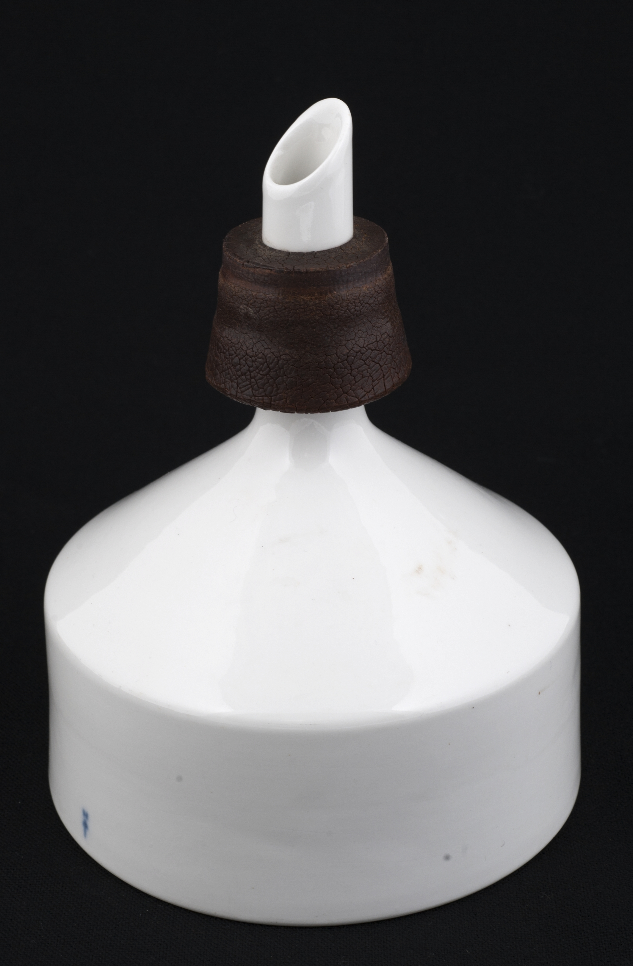 Filter. Filtertrakt av porselen med flat, gjennomhullet bunn. Traktens spiss går igjennom en gummikork. Brukssted: Oslo. Uranienborg Apotek ble opprettet i 1892 og nedlagt i 1971. Mabel Julsrud var apoteker fra 1958 til apoteket ble nedlagt i 1971.